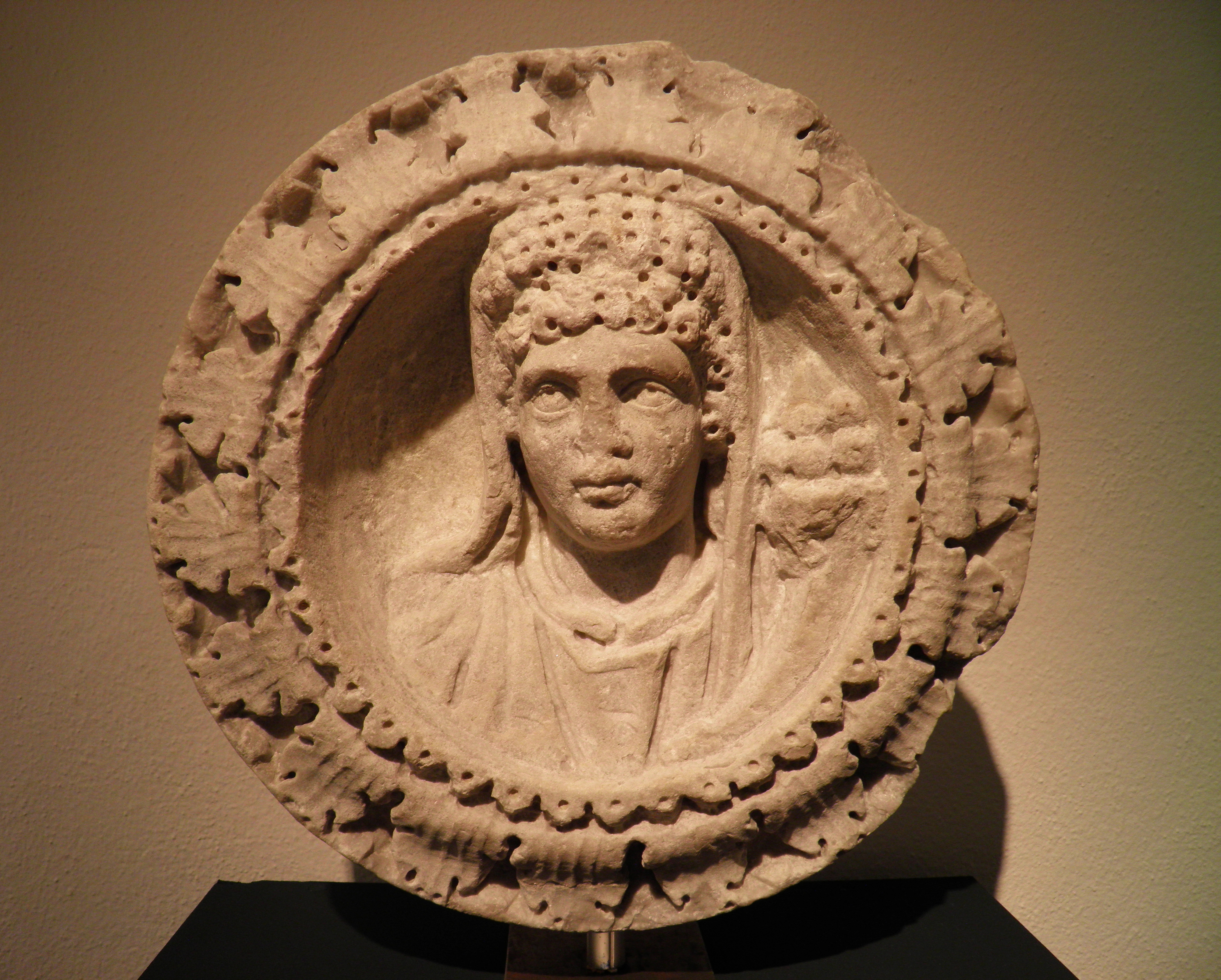 Fortuna, Romisch-Germanisches Museum, Cologne